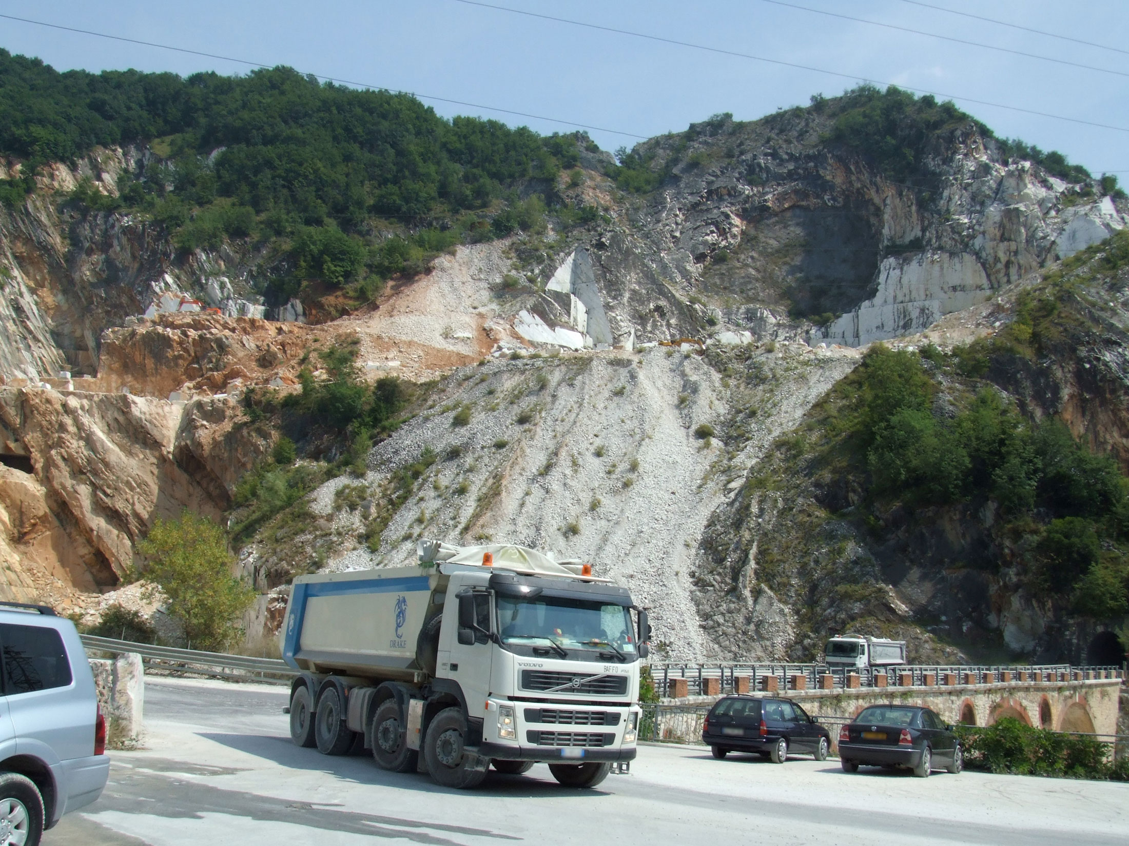 Viaduc emprunté par les camions et les voitures à Carrare